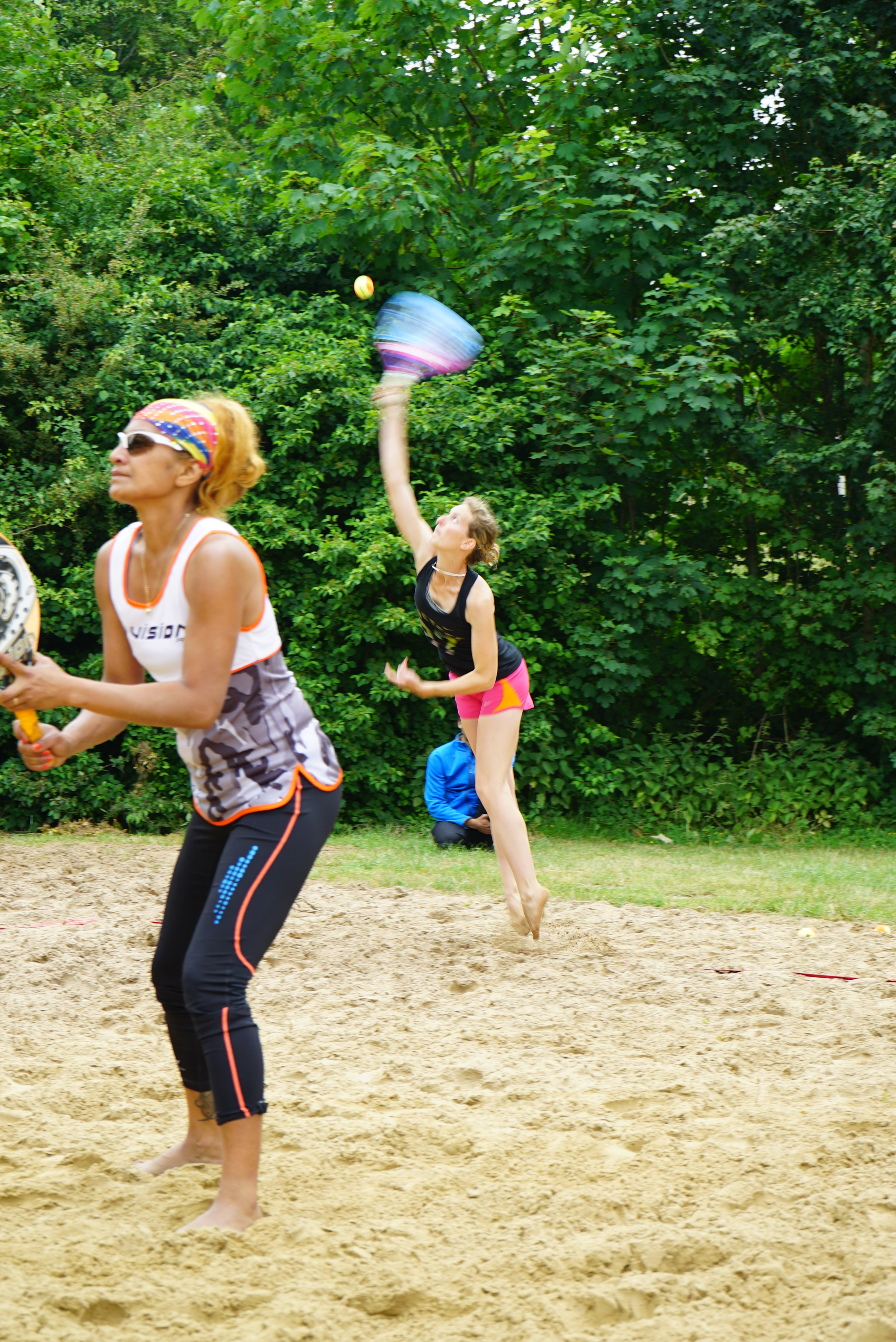 lors du tournoi IFT G4 de Tennis de plage de Sillery.